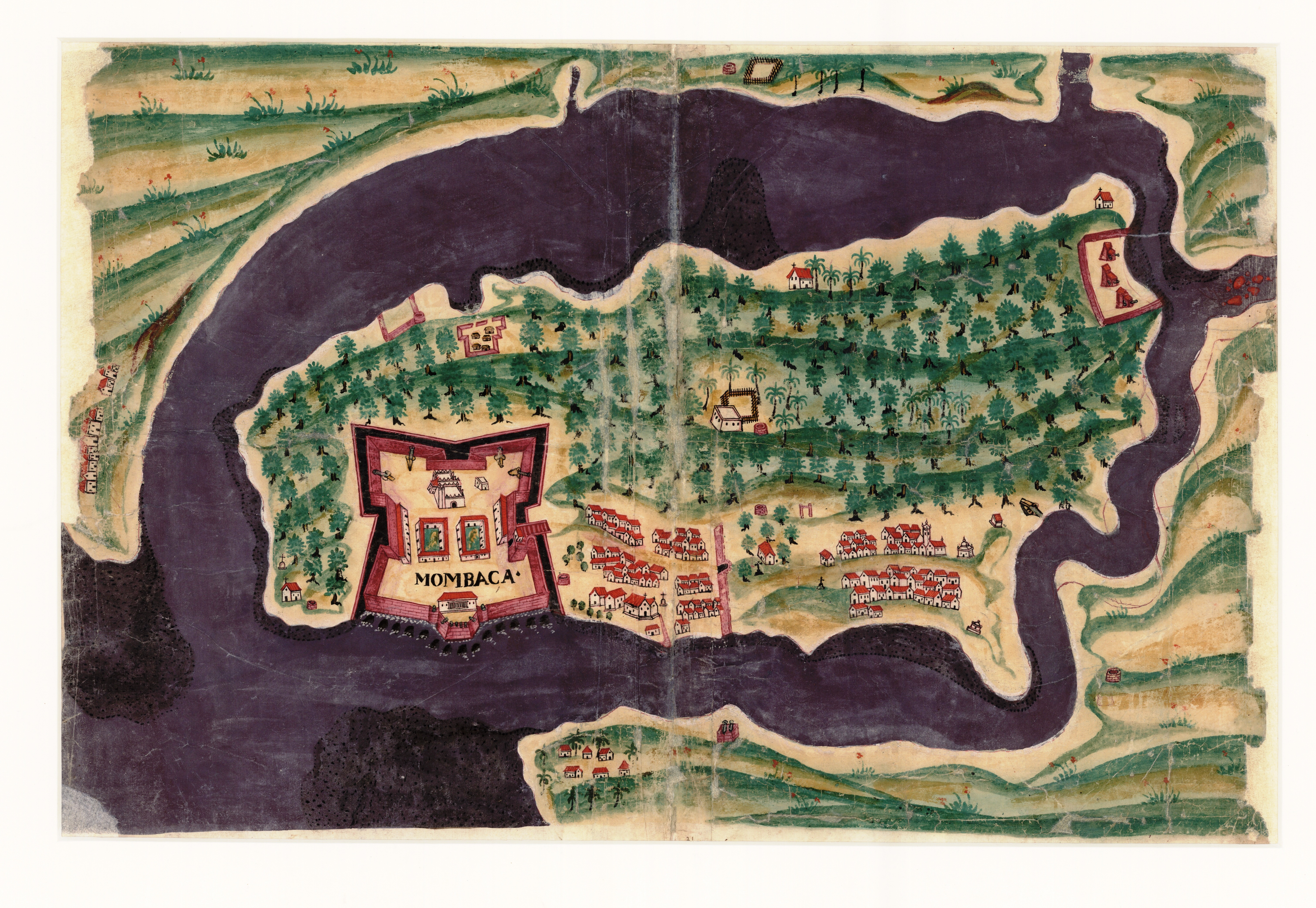 Planta da Fortaleza de Mombaça in BOCARRO, António. Livro das Plantas de todas as fortalezas, cidades e povoaçoens do Estado da Índia Oriental. 1635.